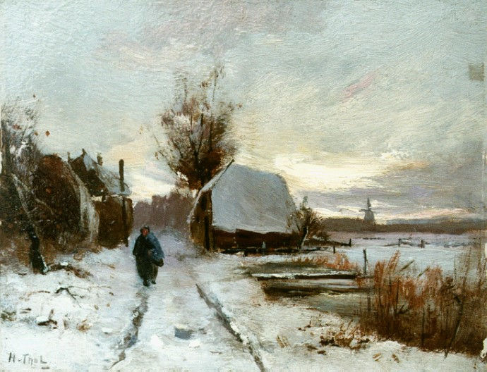 Winterlandschap (ca. 1900) door Hendrik Otto van Thol